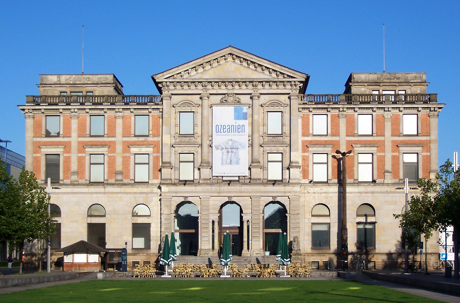 Bremen, Übersee-Museum Das abgebildete Objekt ist ein geschütztes Kulturdenkmal in der Freien Hansestadt Bremen, mit der Nr. 0101 beim Landesamt für Denkmalpflege registriert.